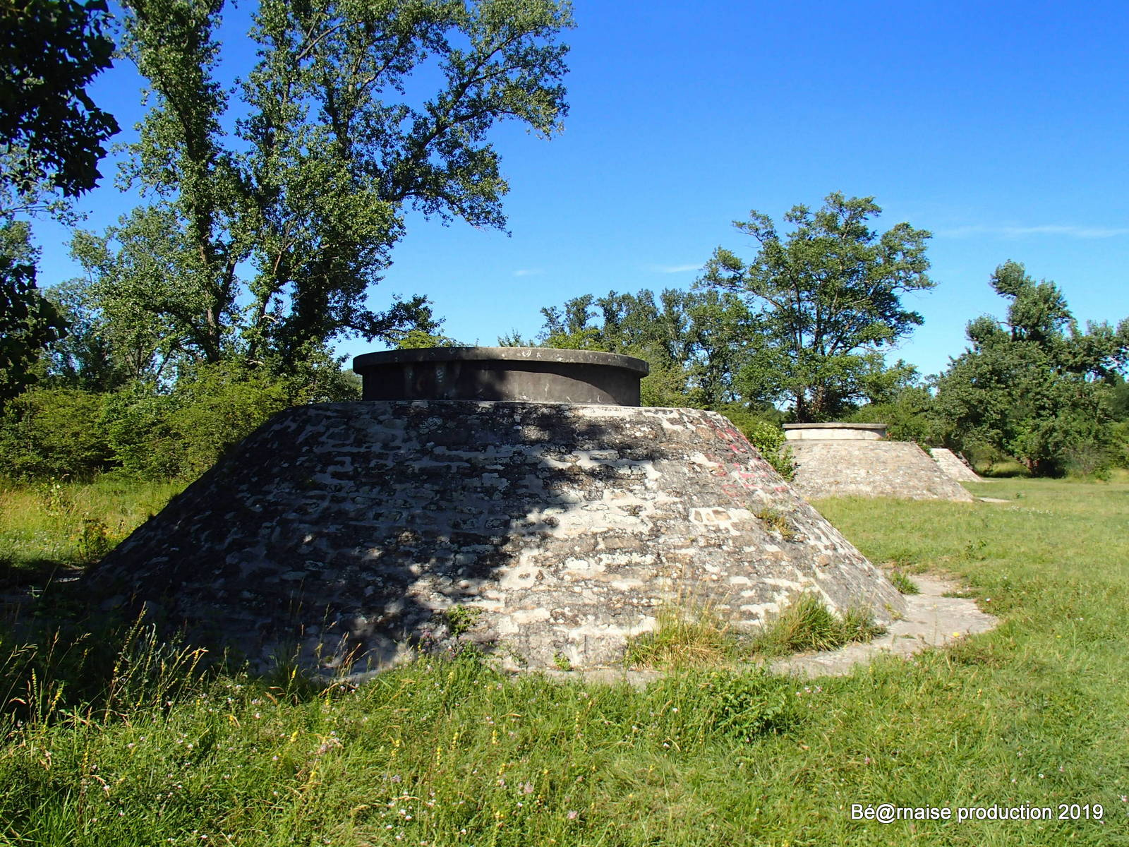 L'ancien site de zone de captage d'eau principale de l'agglomération lyonnaise (1887-1976) est maintenant une partie non aménagée du parc naturel urbain de la Feyssine.